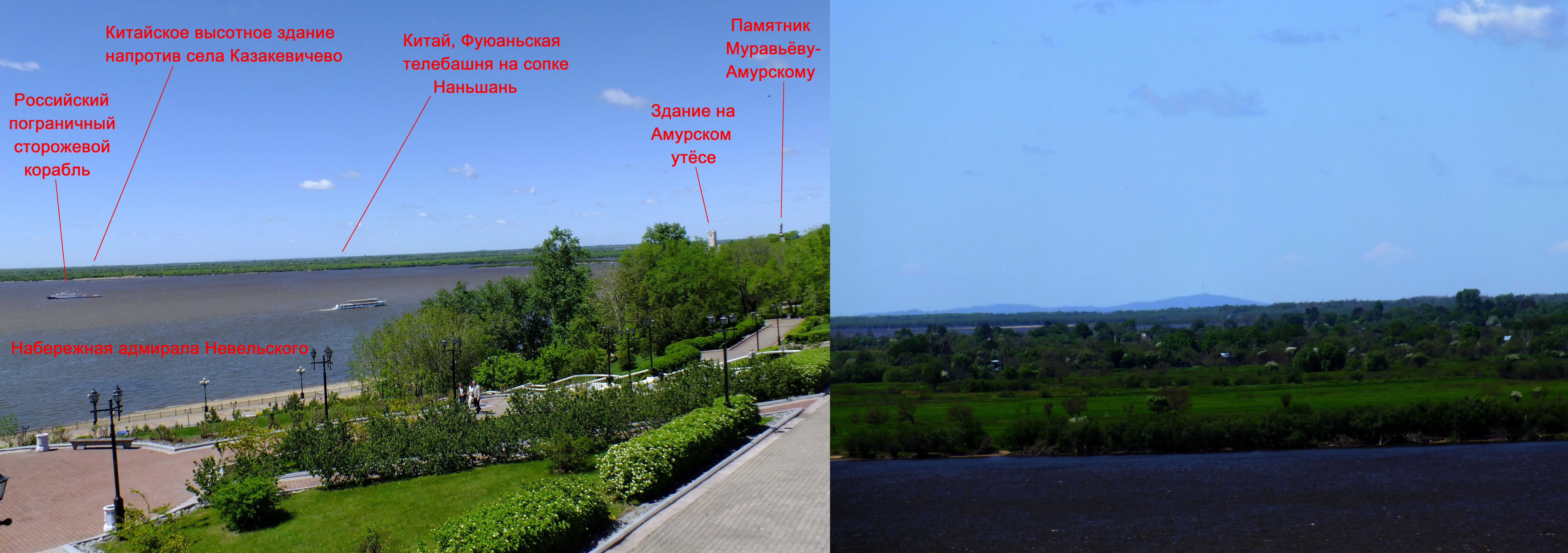 Хабаровск, вид на Амур со смотровой площадки на Комсомольской площади